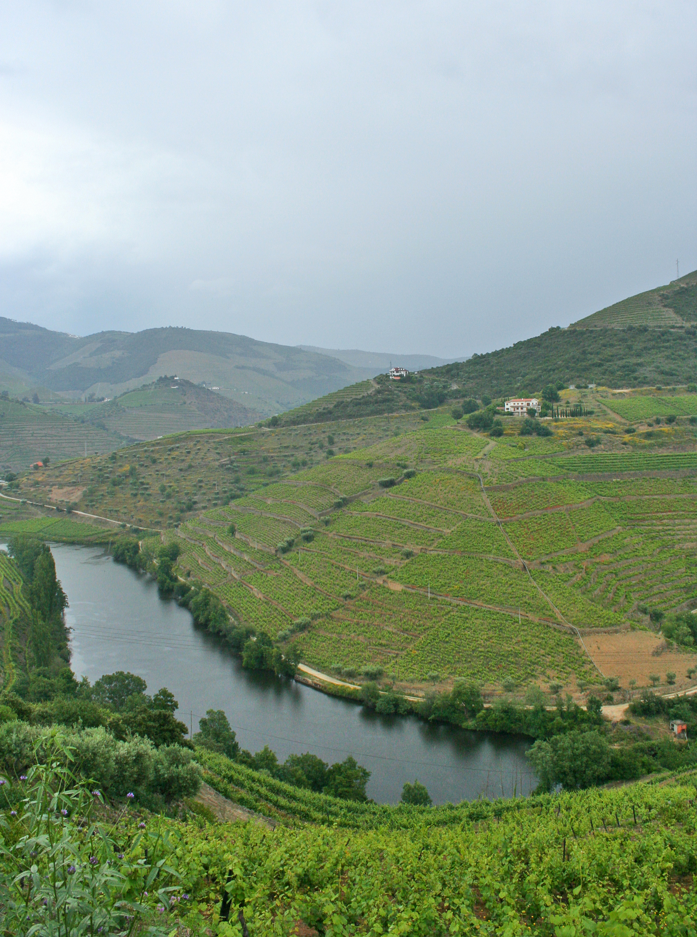 Armamar - Alto Douro Vinhateiro